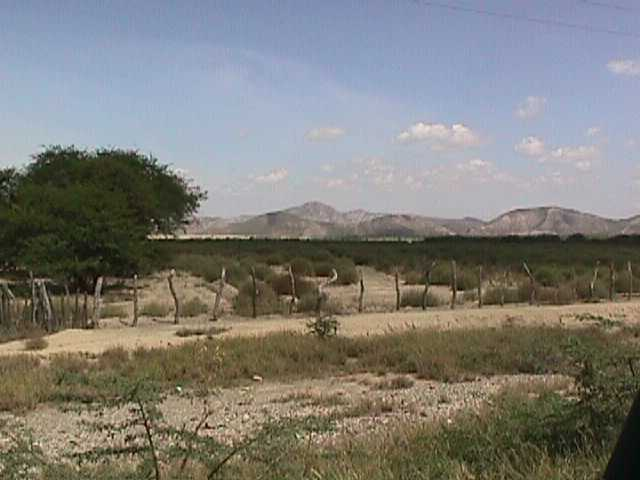 Parque Nacional Cerro Saroche, estado Lara - Venezuela